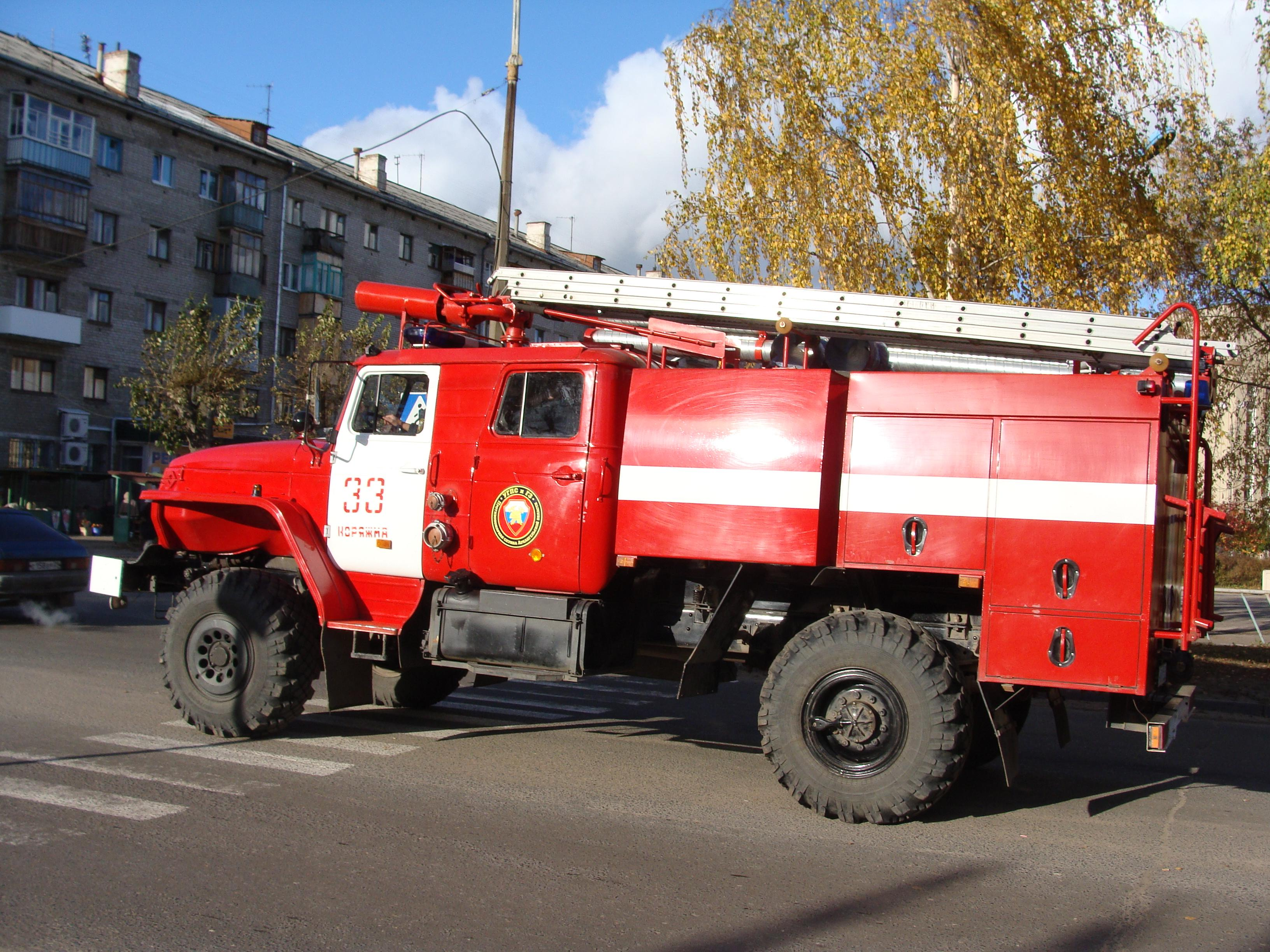 Пожарный автомобиль ПЧ-33 г. Коряжма АЦ 4,0-40 (43206)